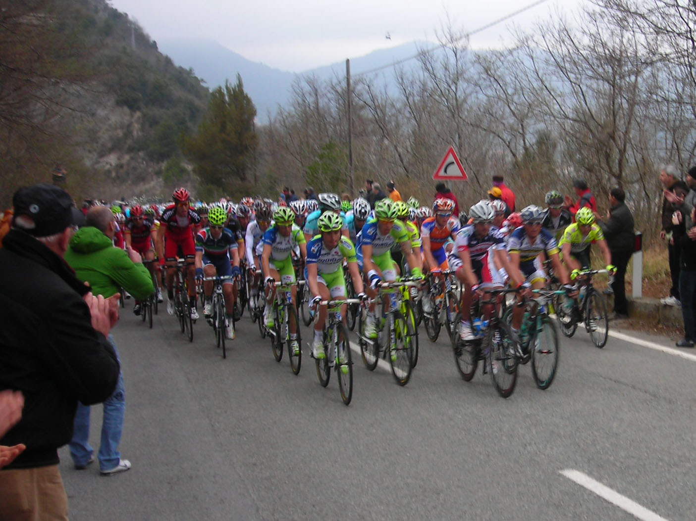 Il gruppo sulle Manie alla Milano-Sanremo 2012